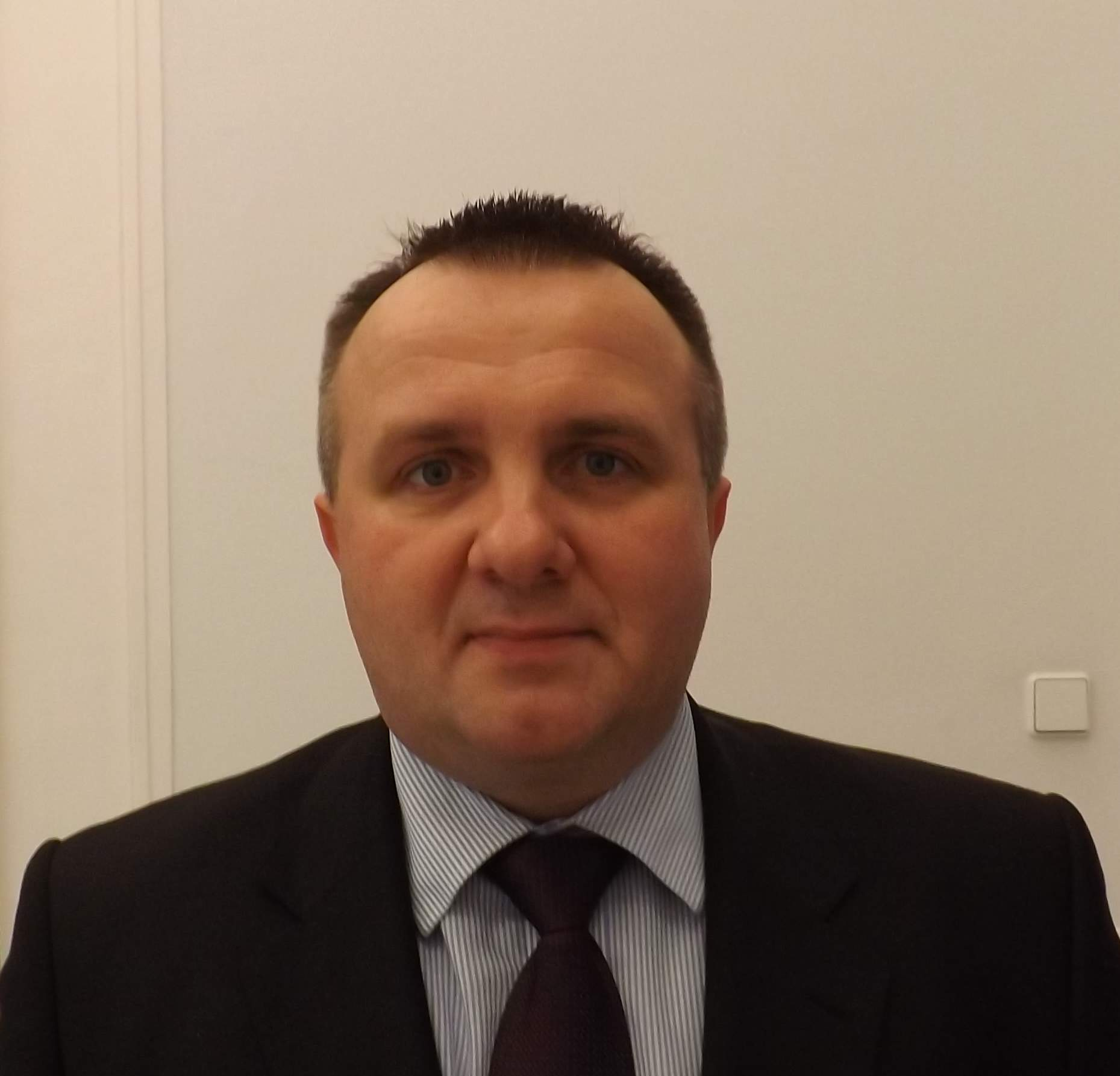 Artur Górczyński, poseł Twojego Ruchu.